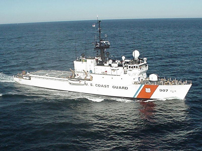 USCGC Escanaba WMEC-907